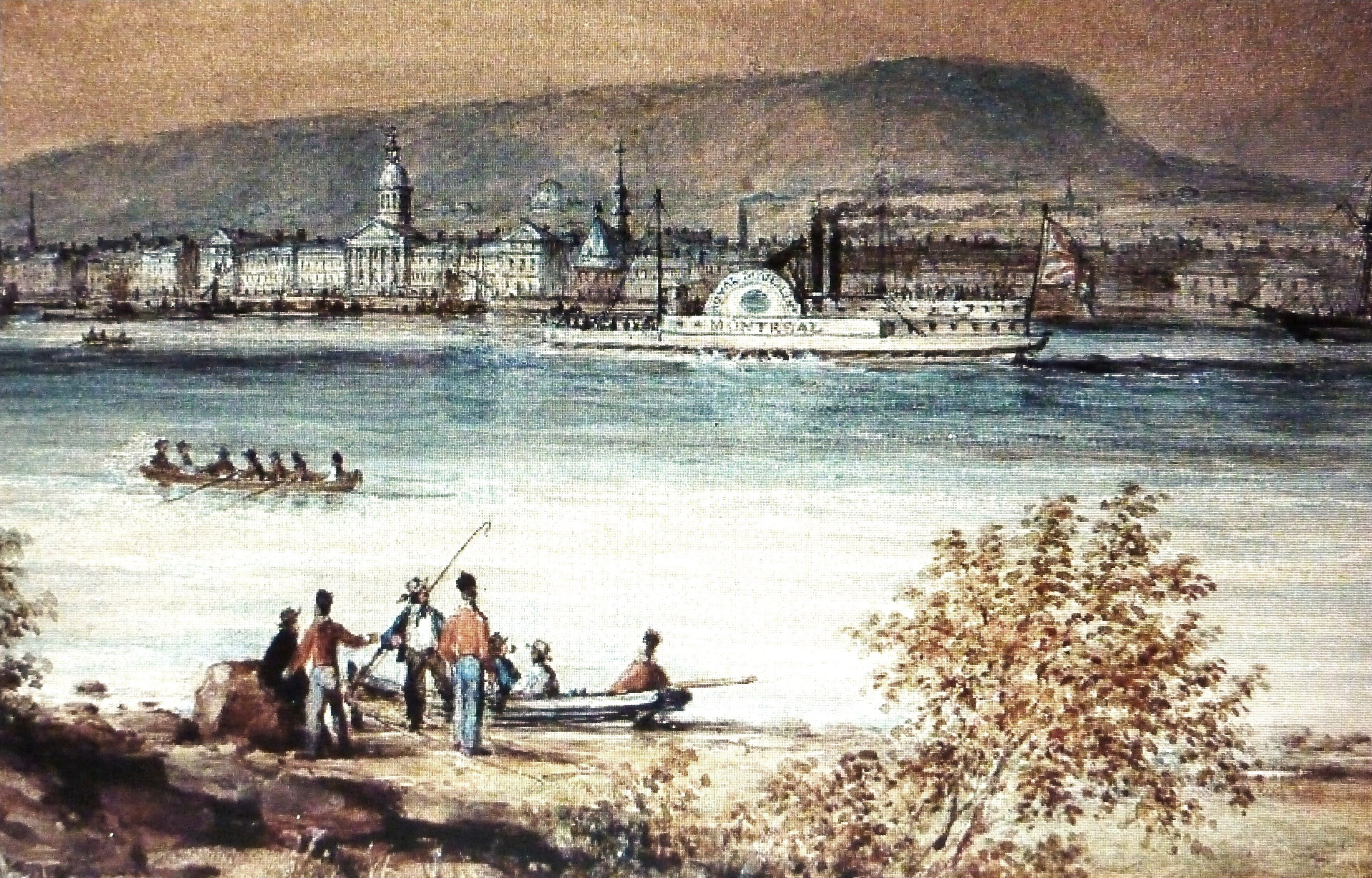 Archives du Musée McCord / James Duncan (1806-1881). L'artiste a représenté ici le vapeur "Montréal" arborant le pavillon britannique. Le "steamship" était un moyen de transport très populaire à l'époque. Le front de mer de l'ancienne ville est bien dessiné; on voit le long édifice du Marché Bonsecours, récemment construit, juste à ses côtés, la chapelle Notre-Dame-de-Bonsecours. Au loin l'expansion urbaine touche maintenant le flanc du mont Royal où on y voit construite une des premières villas monumentales à la hauteur de avenue des Pins, il s'agit peut-être de celle de Simon McTavish qu'on surnommait "Marquis de la fourrure". John Molson, cet Irlandais entreprenant, construit en 1809 le premier navire à vapeur au pays. La flotte Molson assure le service régulier de passagers et du courrier entre Québec et Montréal et servira aussi, lors de l'invasion américaine de 1812, au transport des troupes.